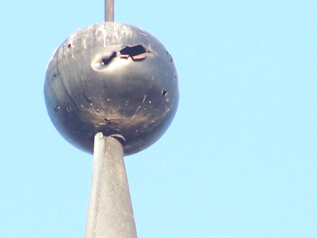 Špička kostelní věže v Narzymiu, Polsko